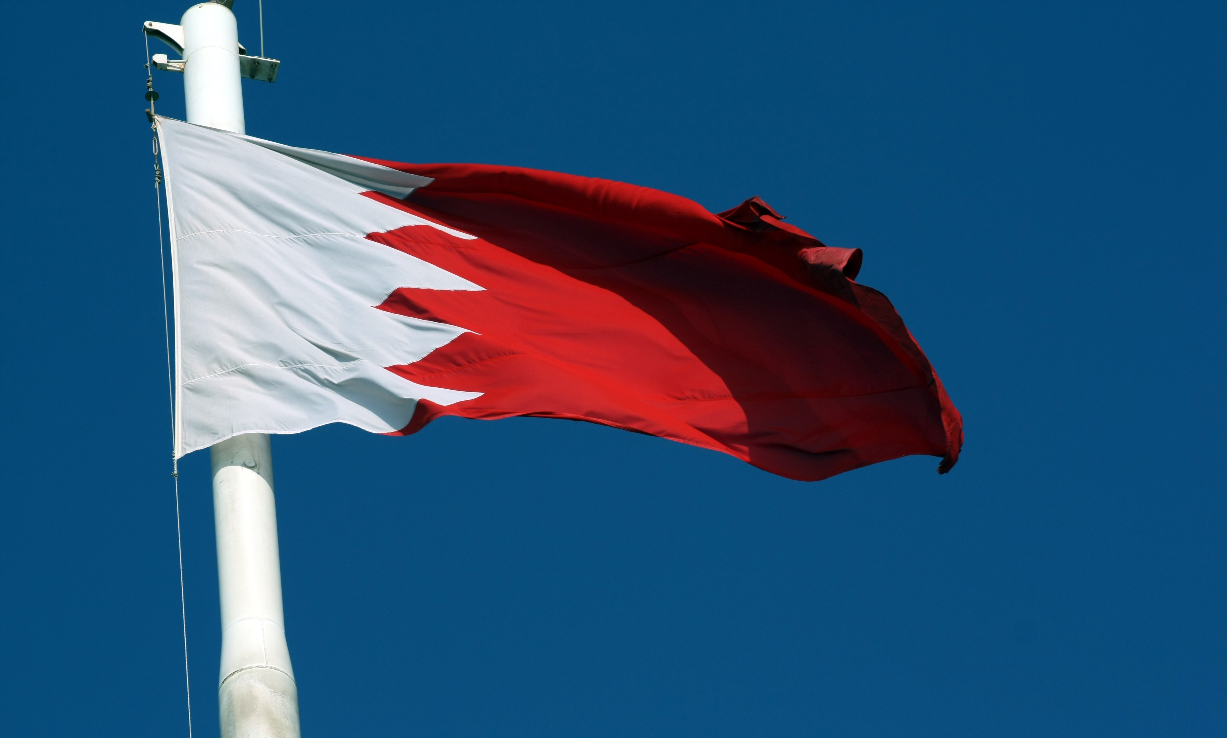 KINGDOM OF BAHRAIN NATIONAL FLAG